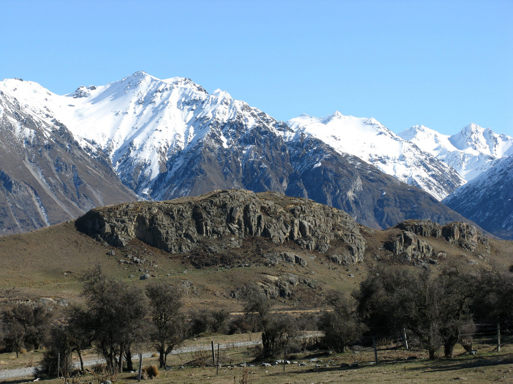 Mt. Sunday, que sirvió como locación de Edoras, en los filmes de El Señor de los Anillos.